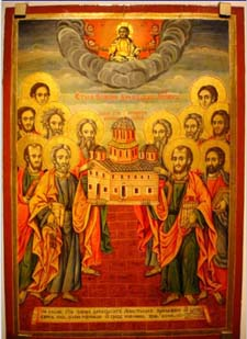 "Собор на Апостолите, 1898 г., зограф Јосиф Радевич од с. Лазарополе". Изработена е од дрво и темпера. "Приложил терзиски еснаф од пред Куманово"